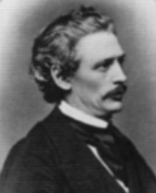 Helvig Conrad Engelhardt (*1825; † 1881), Danish archaeologist